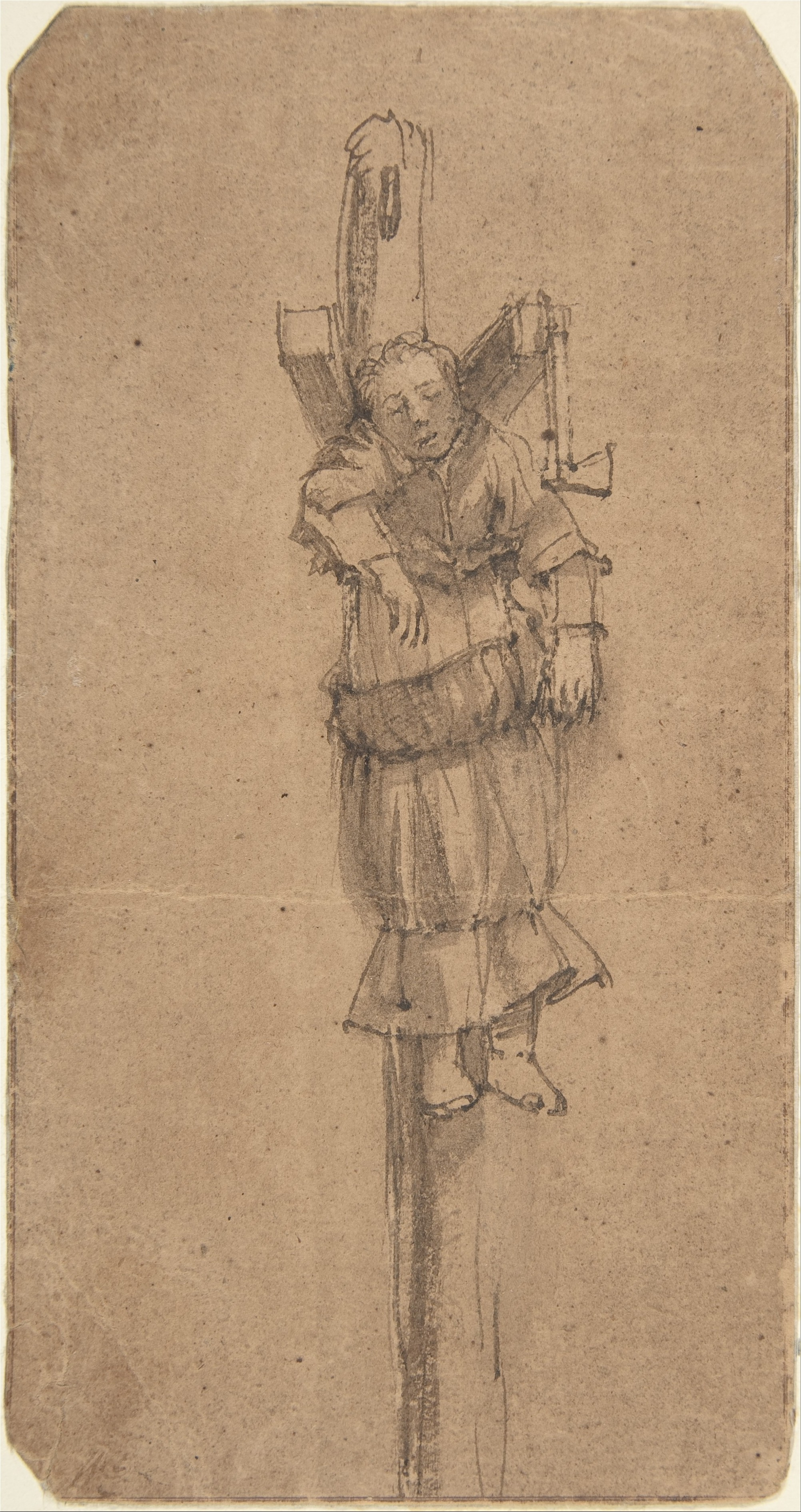 Drawing; Drawings